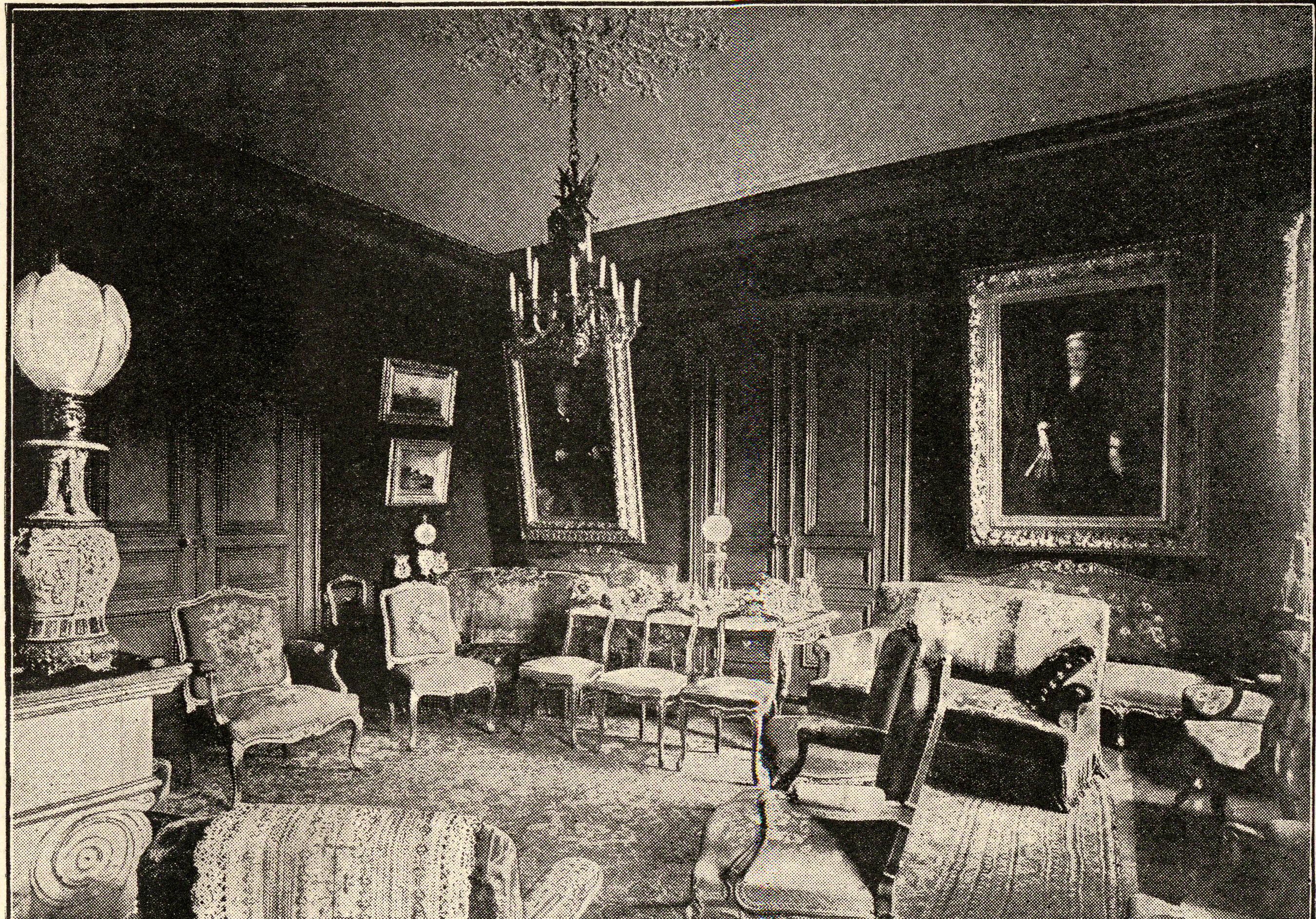 La maison du 2 rue Charles Dubois à Amiens (Somme), où Jules Verne a vécu de 1882 à 1900. Vue du grand salon, appelé aussi "salon de musique".